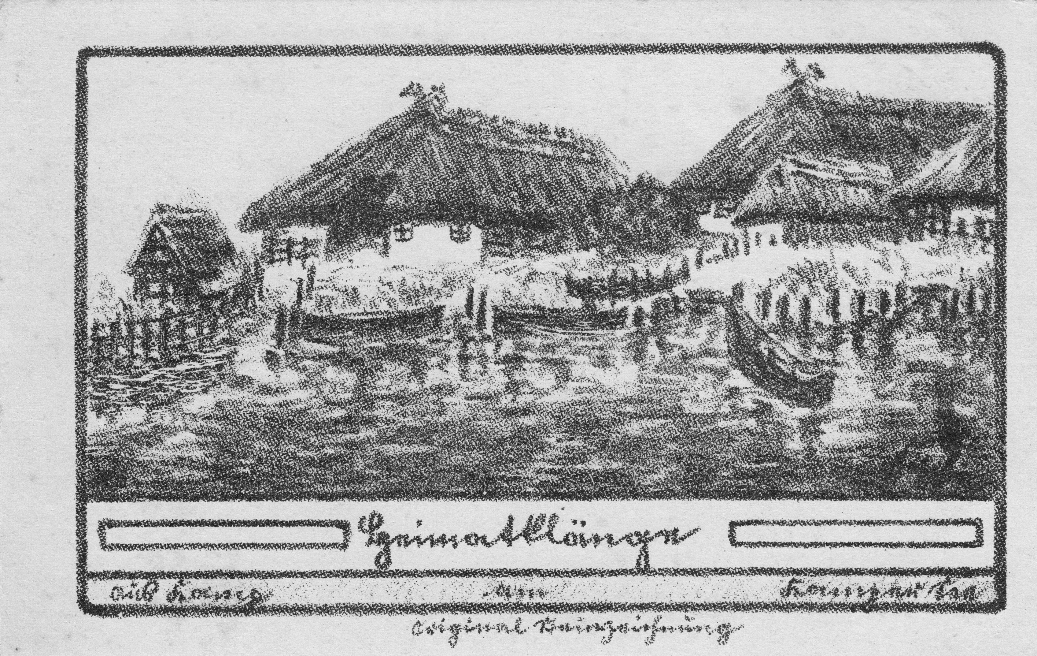 Deutsche Postkarte aus ca. 1900 bis 1910